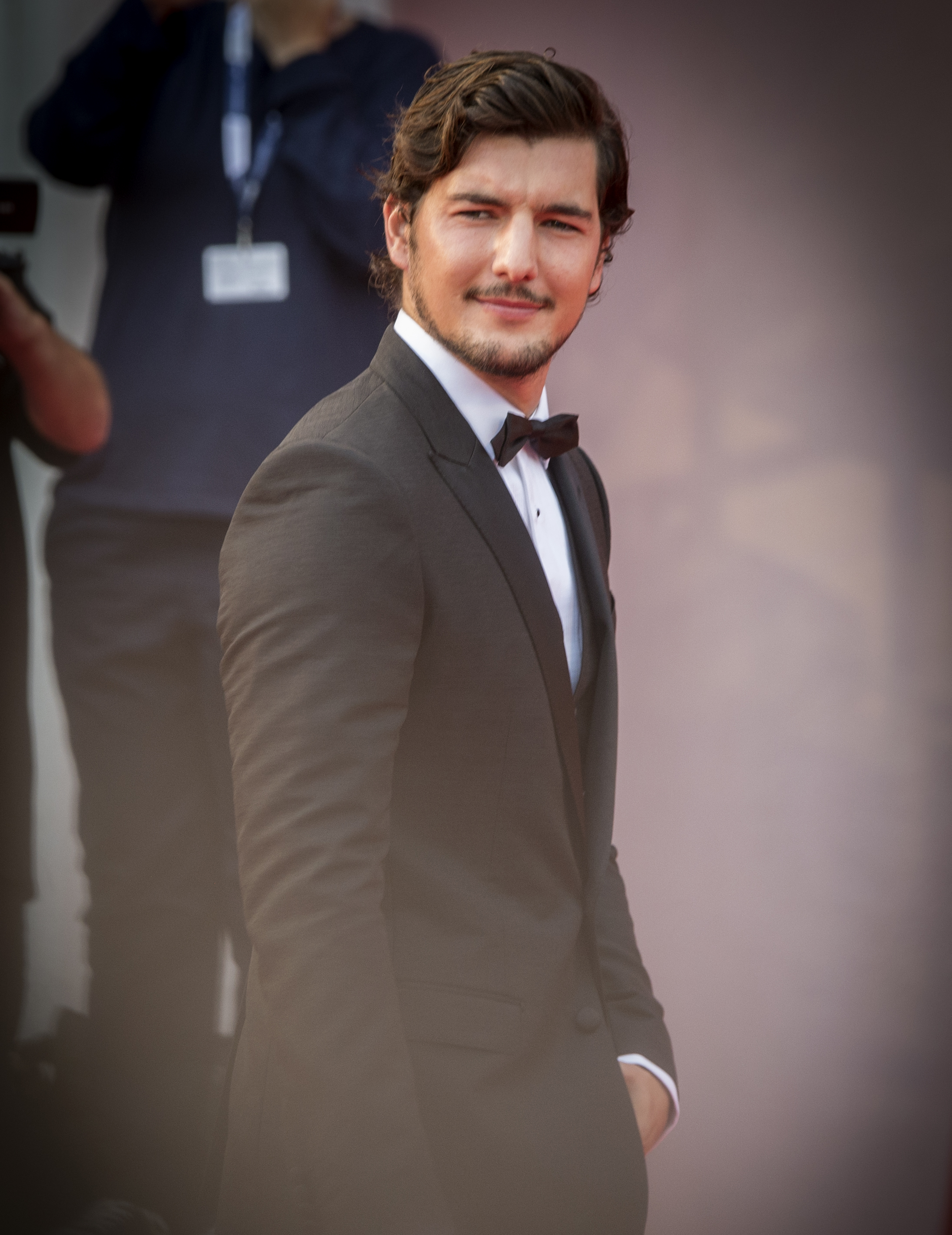 Andrea Preti sul red carpet della 72^ edizione del Festival del Cinema di Venezia.